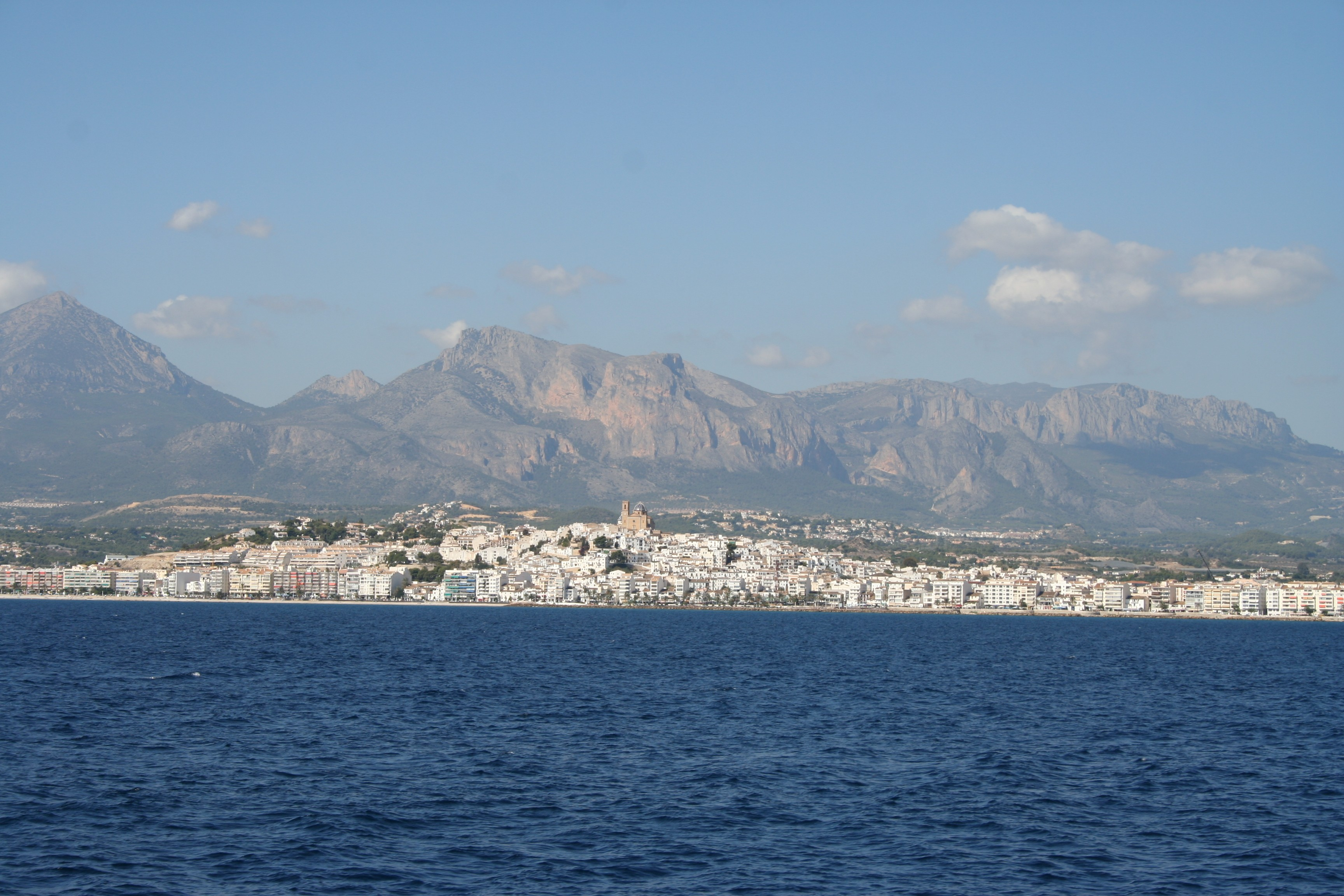 Vista general de Altea desde el mar, en Alicante (España)